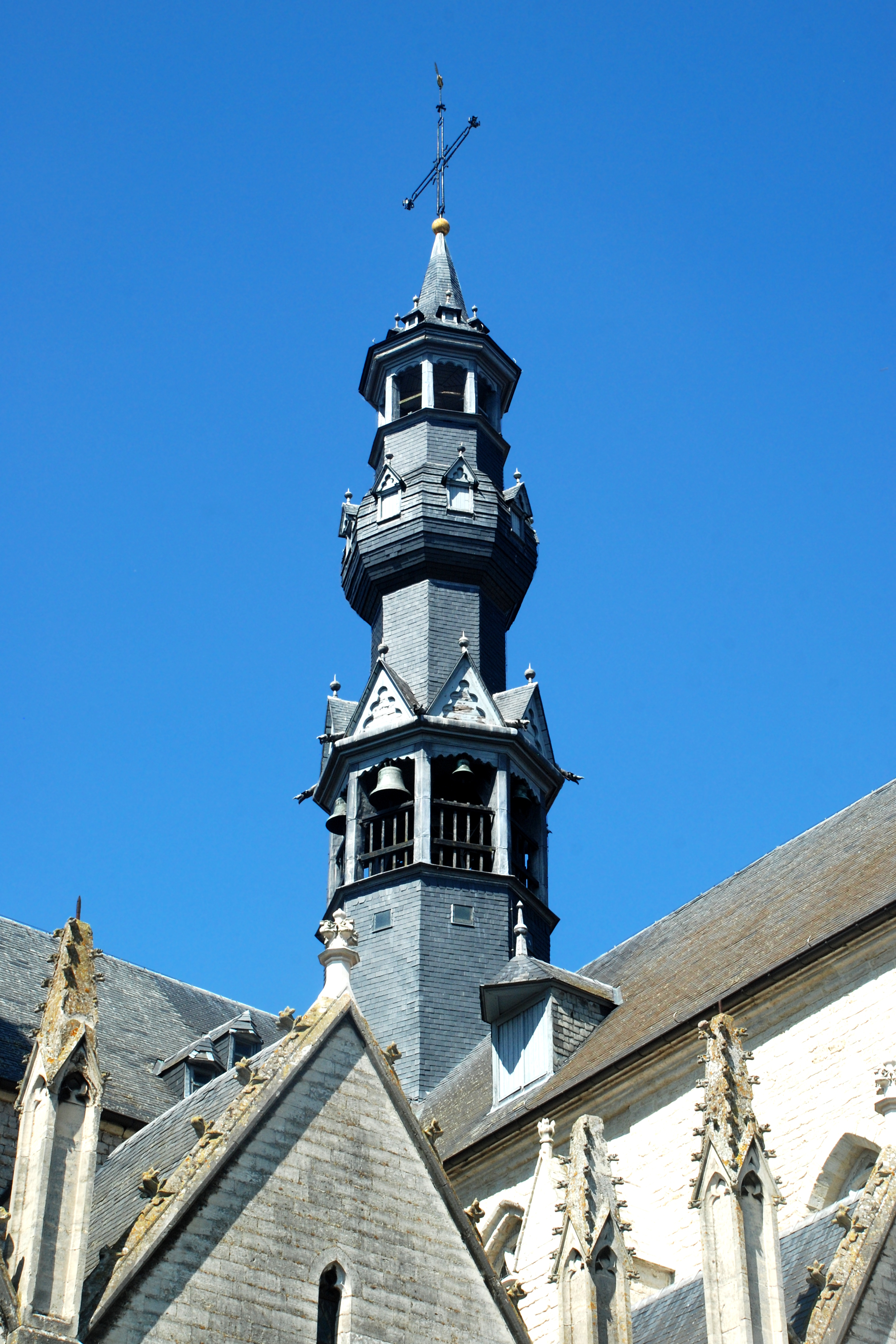 Belgique - Brabant flamand - Léau (Zoutleeuw) - Église Saint-Léonard (Sint-Leonarduskerk)